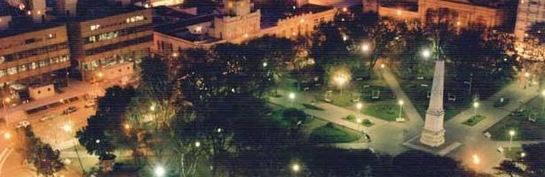 Vista nocturna de parte de la Plaza Gral. Francisco Ramírez, del Centro Cívico y de la Policía de la Provincia de Entre Ríos. La imagen fue redimensionada de la original tomada de bajo la licencia mencionada.